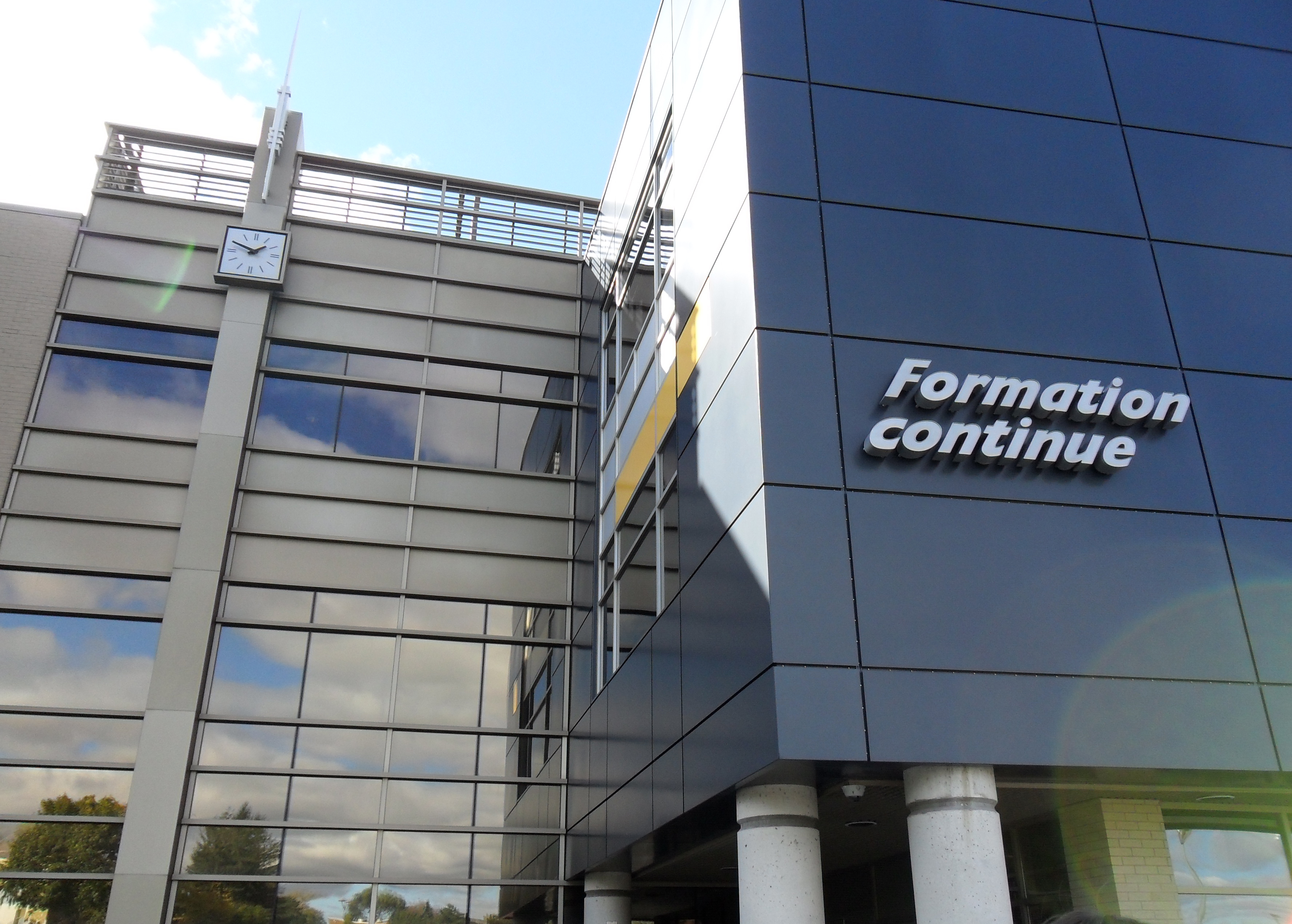 Pavillon de la formation continue du Cégep de Sainte-Foy, Québec.